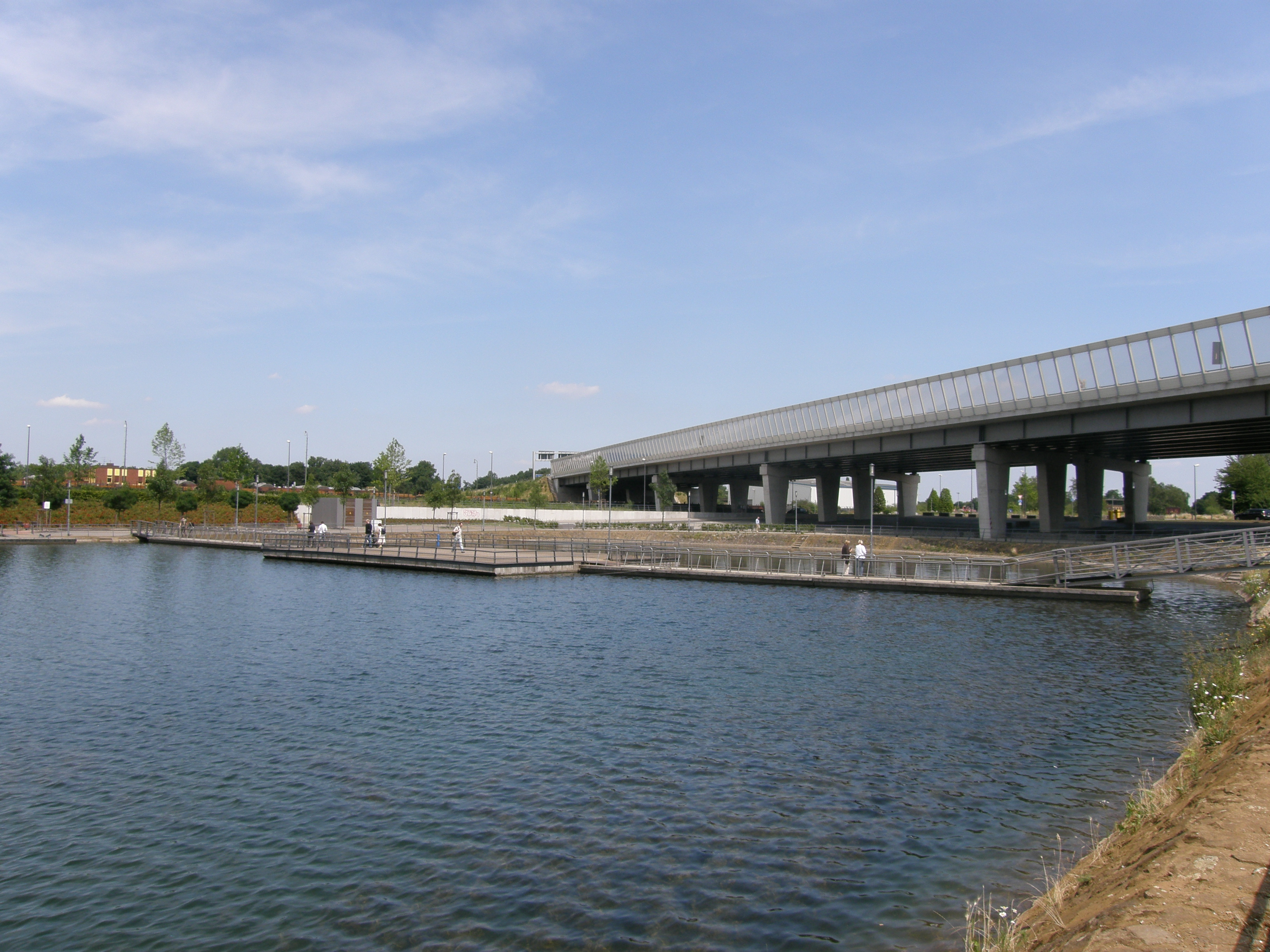 Innenhafen Duisburg "überdachter" Parkplatz an der A59 am Innenhafen, davor der Ponton am östlichen Ende des Hafenbeckens